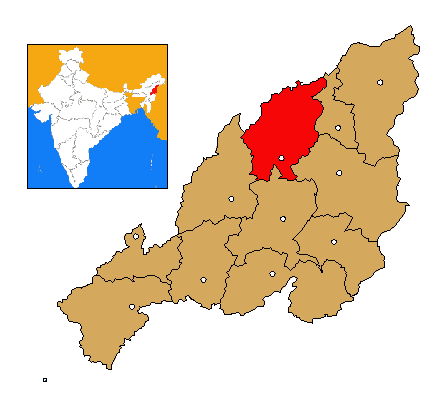 Mapa de localización del distrito